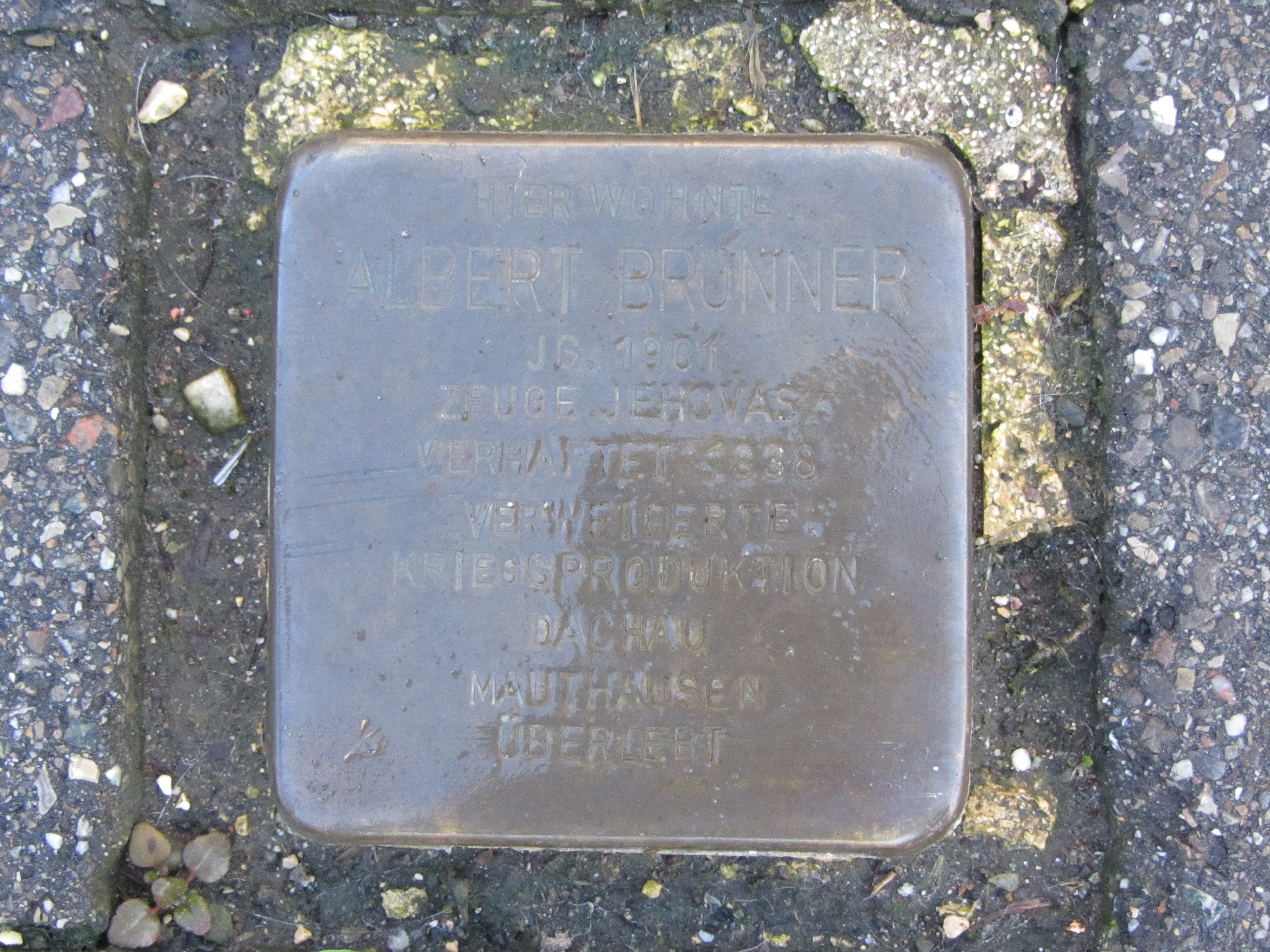 der Stolperstein für Albert Bronner vor dem Haus Wiesenstraße 2 in Singen